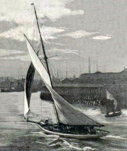 'L'Estérel', côtre d'Émile Billiard et Paul Perquel, champions olympiques 1900 en 10-20 tonneaux.